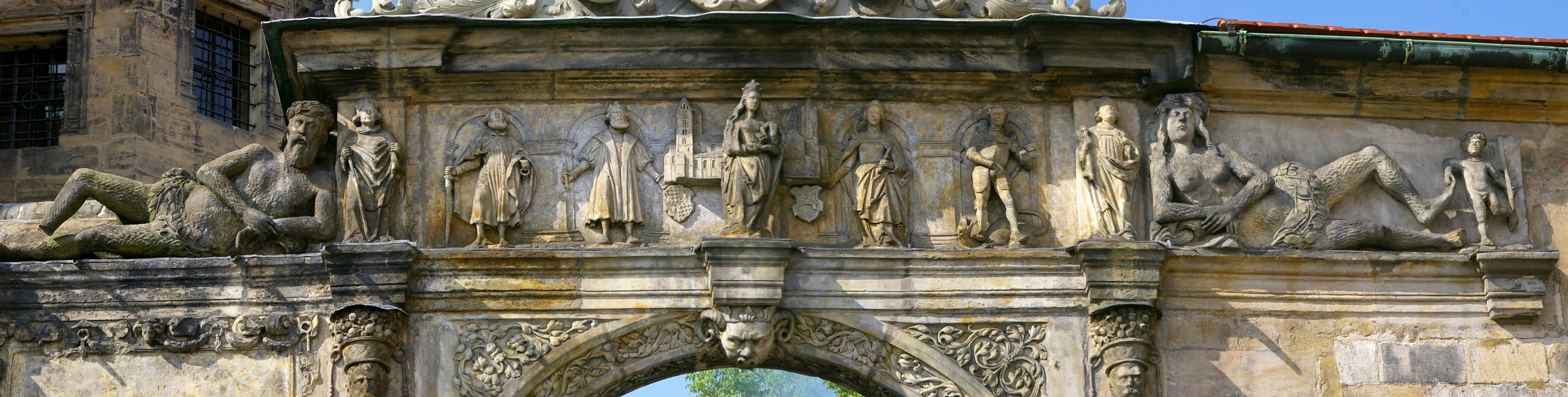 Bamberg - Alte Hofhaltung - Prachtportal